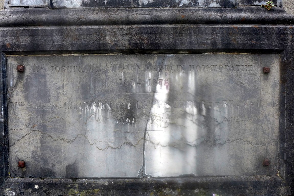 Épitaphe du Dr Chatron 1804 - 1876